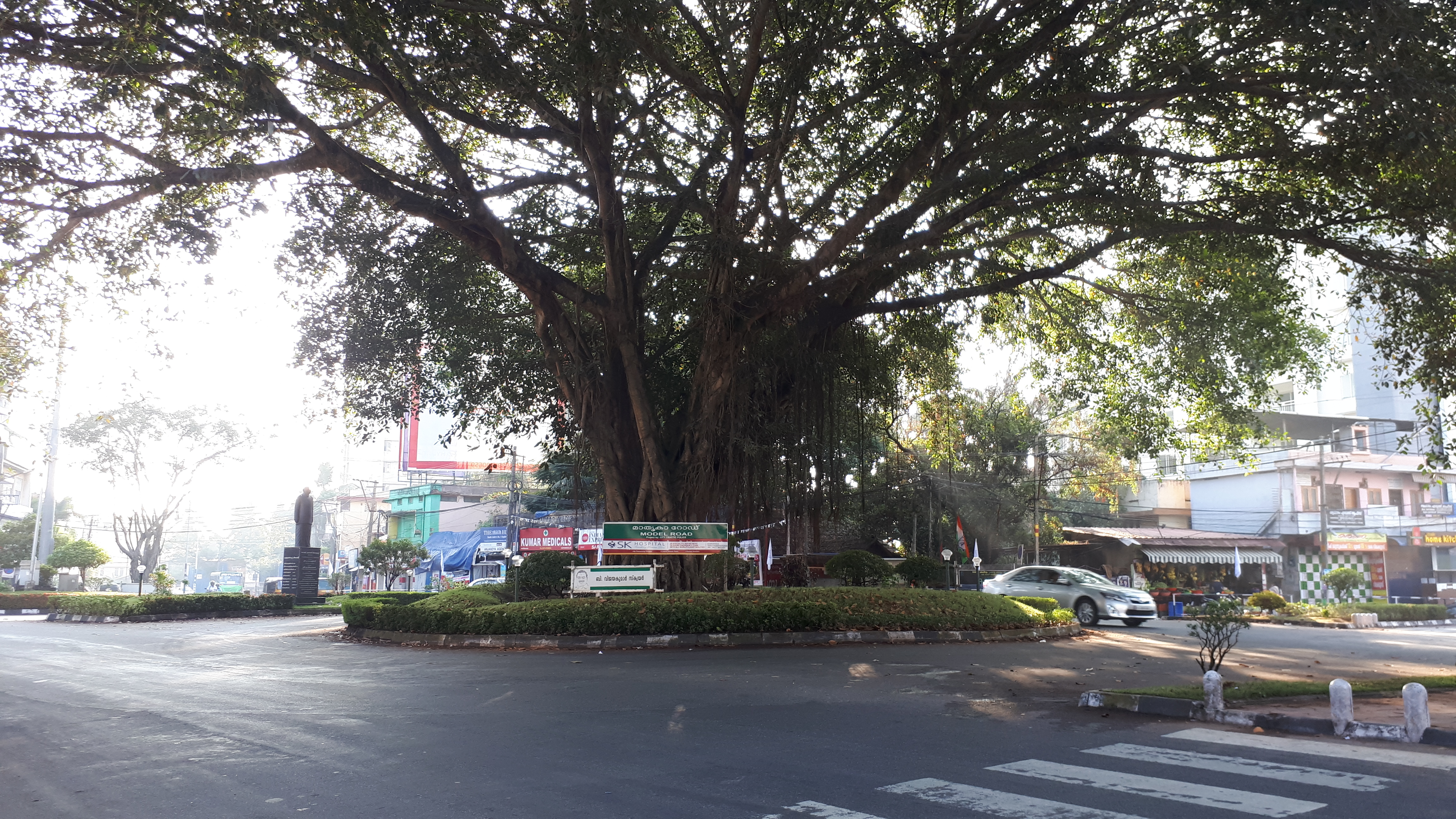 human settlement